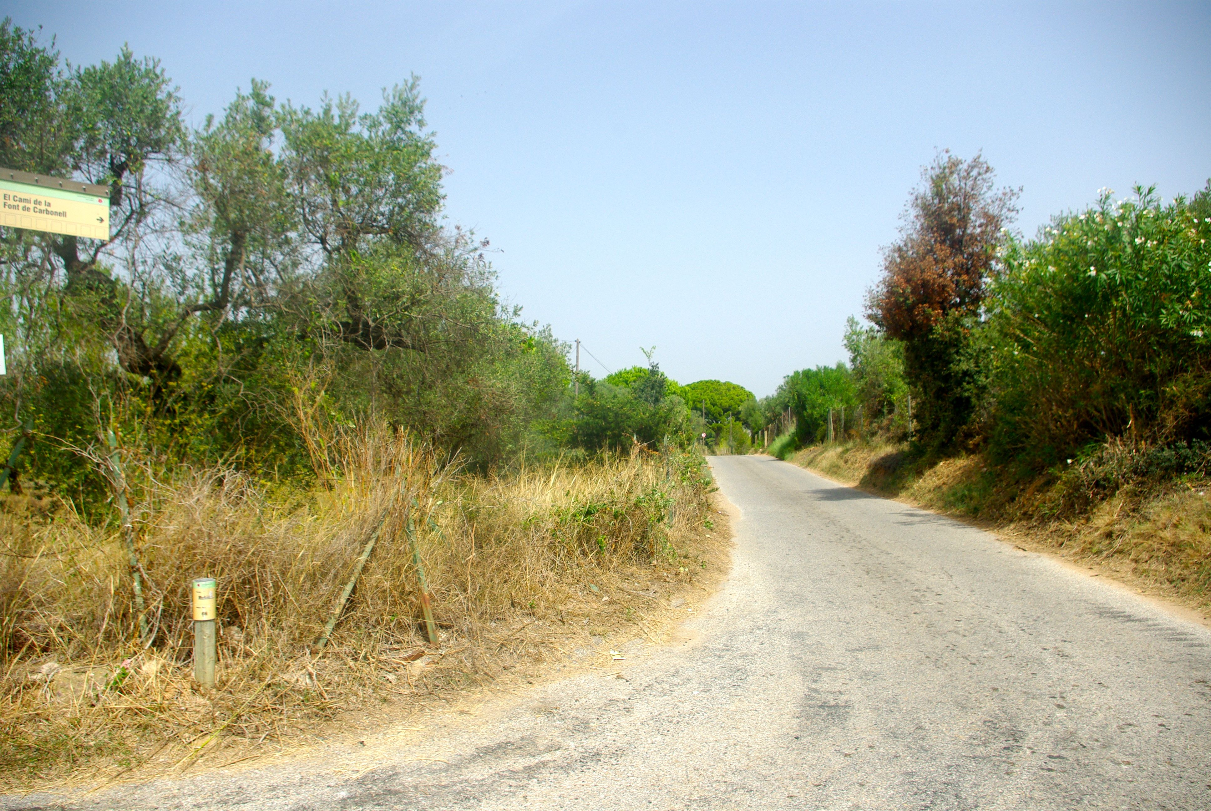 El Camí de la Font del Carbonell, al terme de Reus